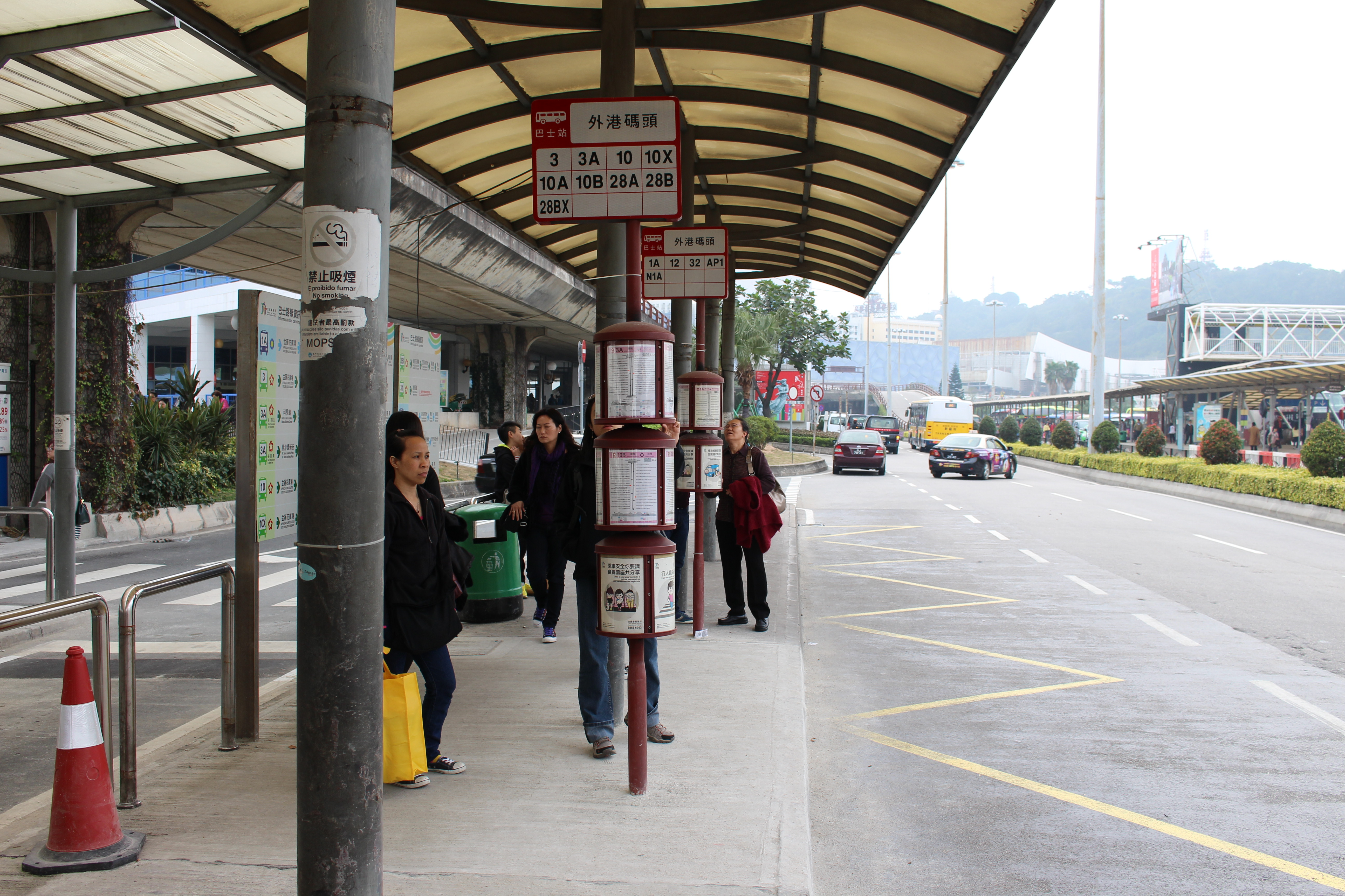 2015年2月的外港碼頭站.